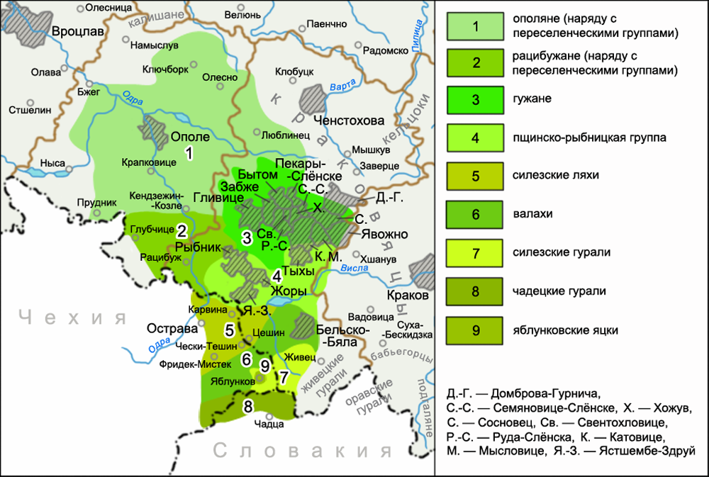 Карта распространения субэтнических групп в Верхней Силезии (согласно исследованиям Я. Камоцкого). Источник: Kamocki J. Zarys grup etnograficznych w Polsce // Annales Universitatis Mariae Curie-Skłodowska. Sectio F, Historia. — Lublin, 1991/1992. — Vol. XLVI/XLVII, 6.